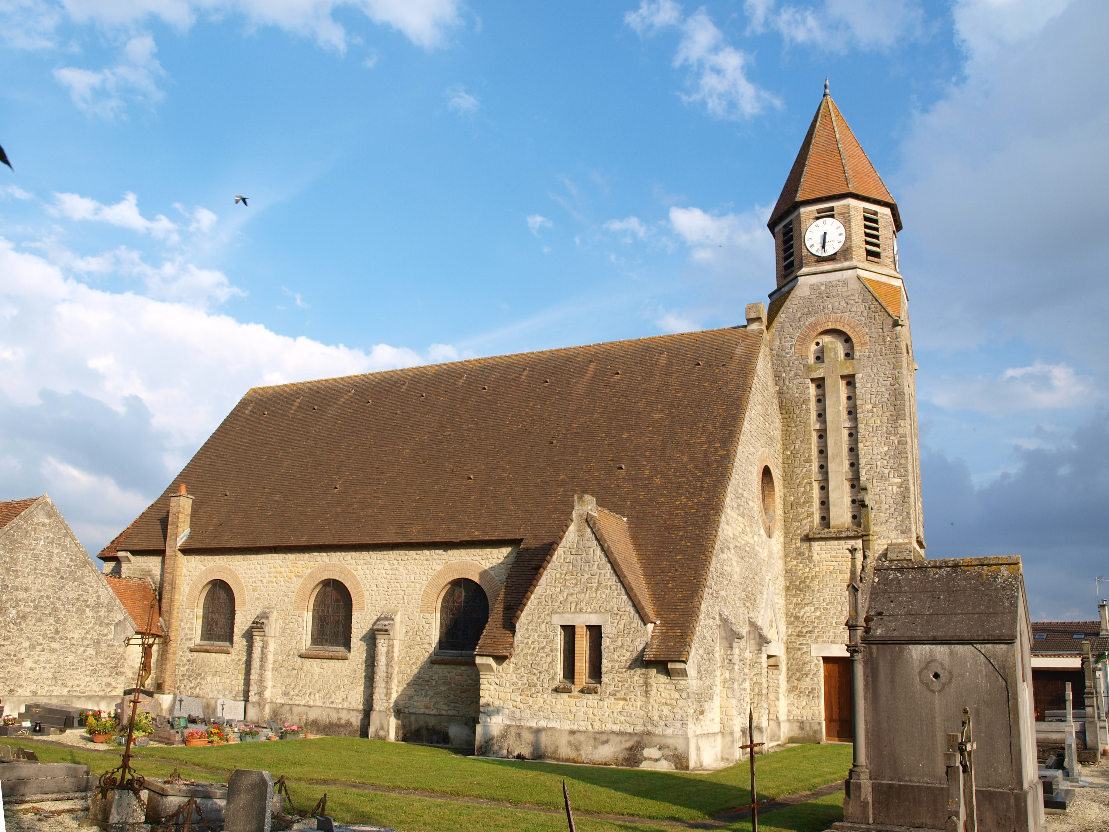 Aussonce (Ardennes, France) ; église.